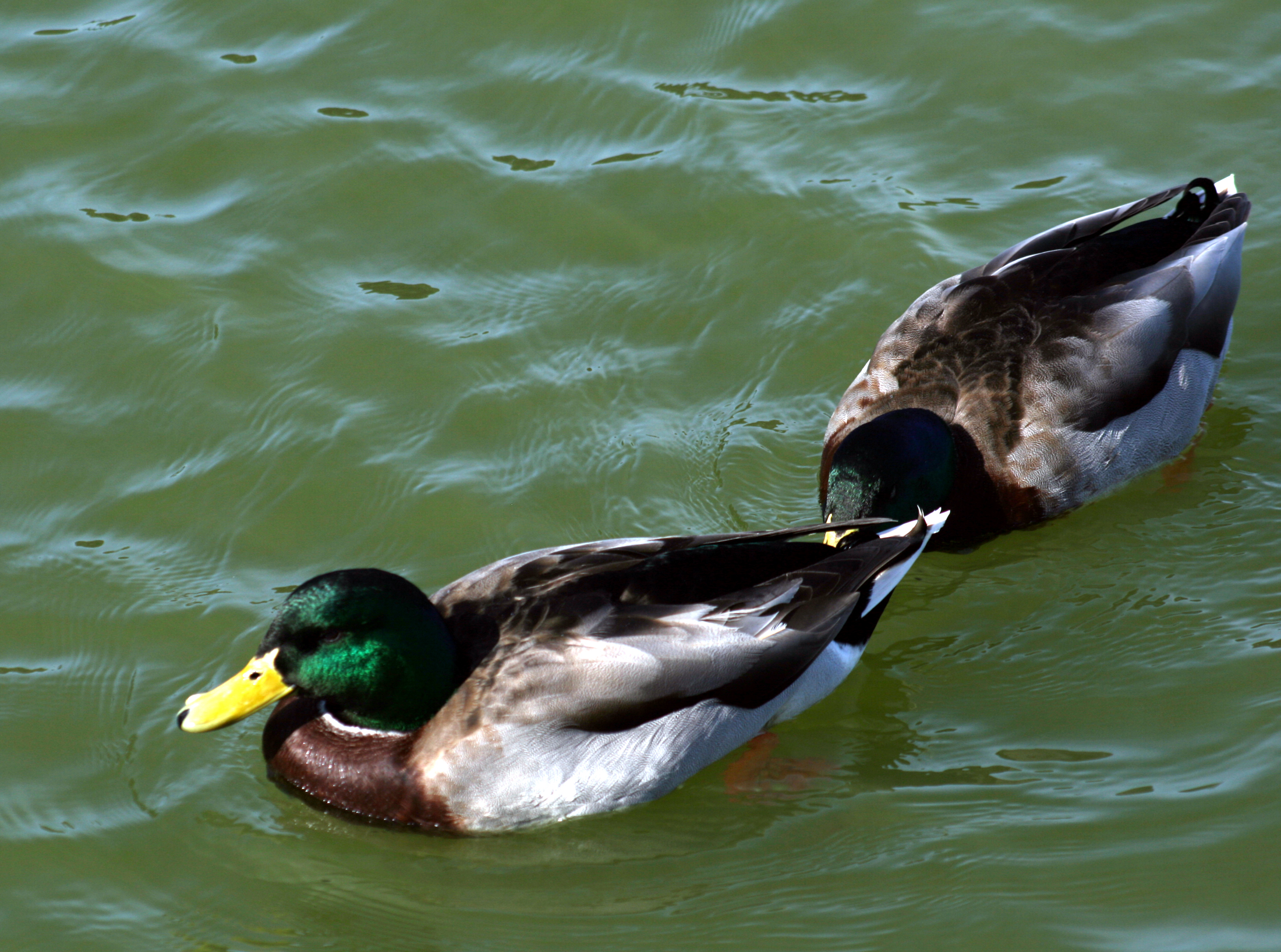 Males Anas platyrhynchos (Mallard)